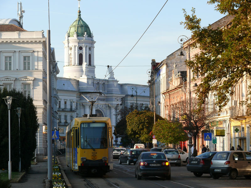 Arad belvárosa